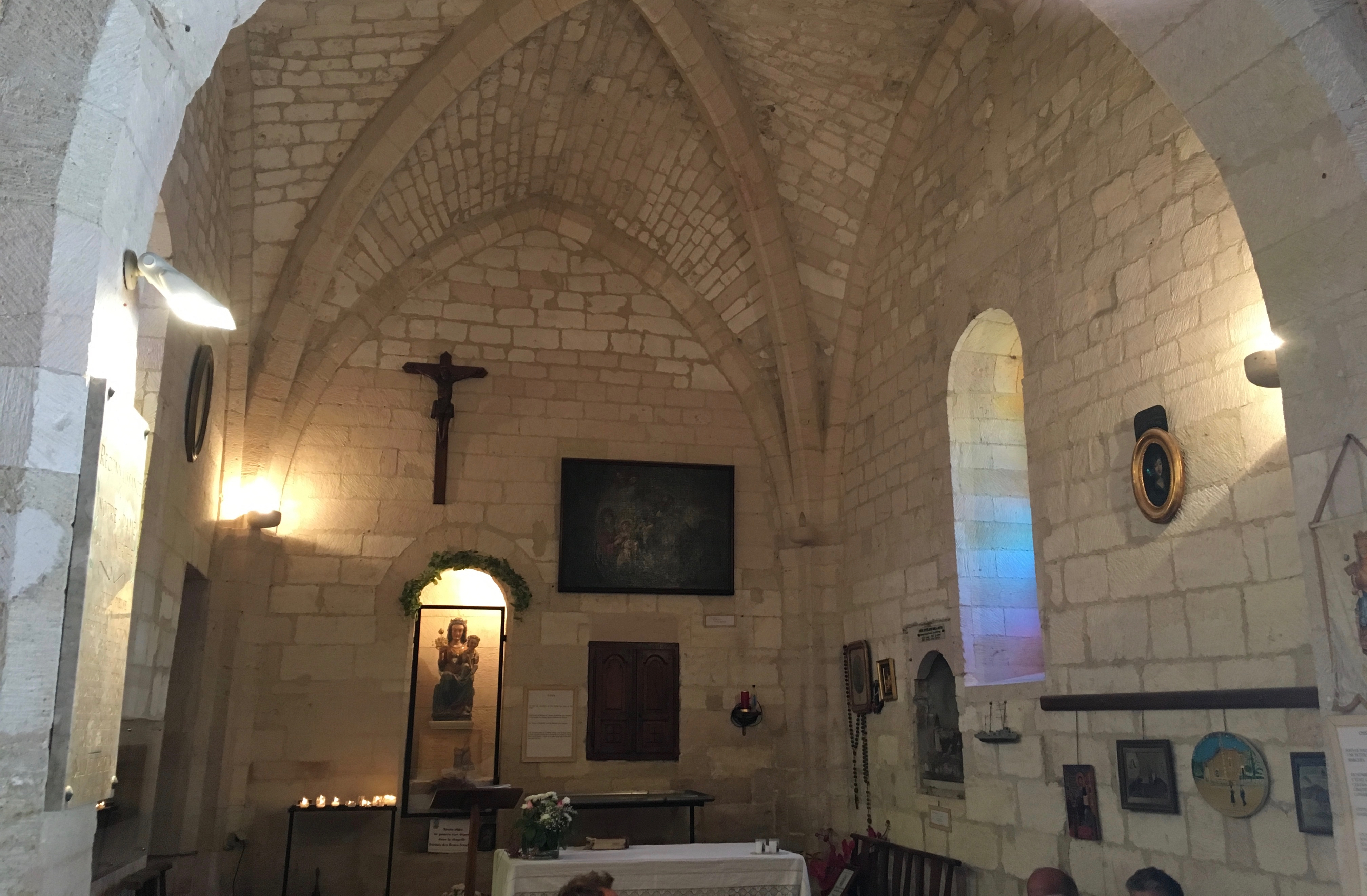 Notre-Dame de la Galline (ou Galine) est une chapelle située au hameau de la Nerthe, à la pointe nord-ouest de la commune de Marseille, sur l'ancien chemin reliant l'Estaque à Gignac. Intérieur de la chapelle